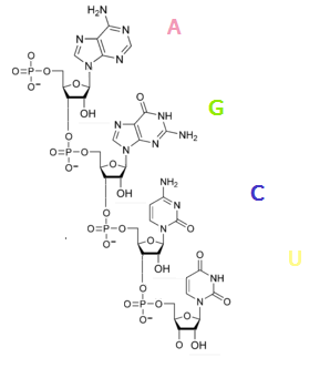 RNA polinukleotido